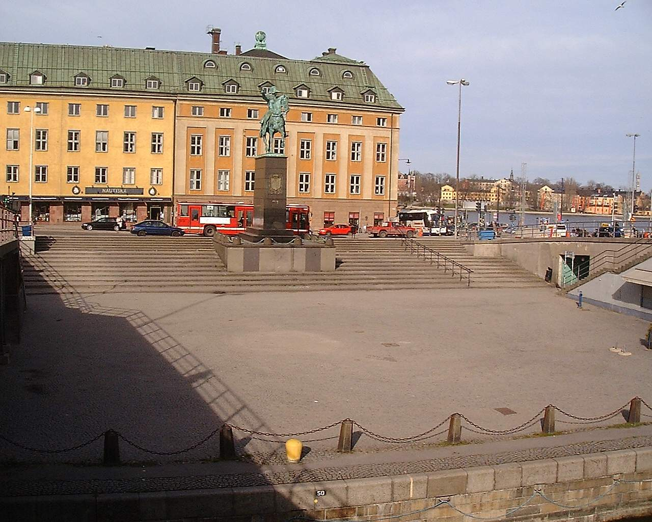 Statue of Charles XIV John at Karl Johans Torg, Gamla stan, Stockholm.